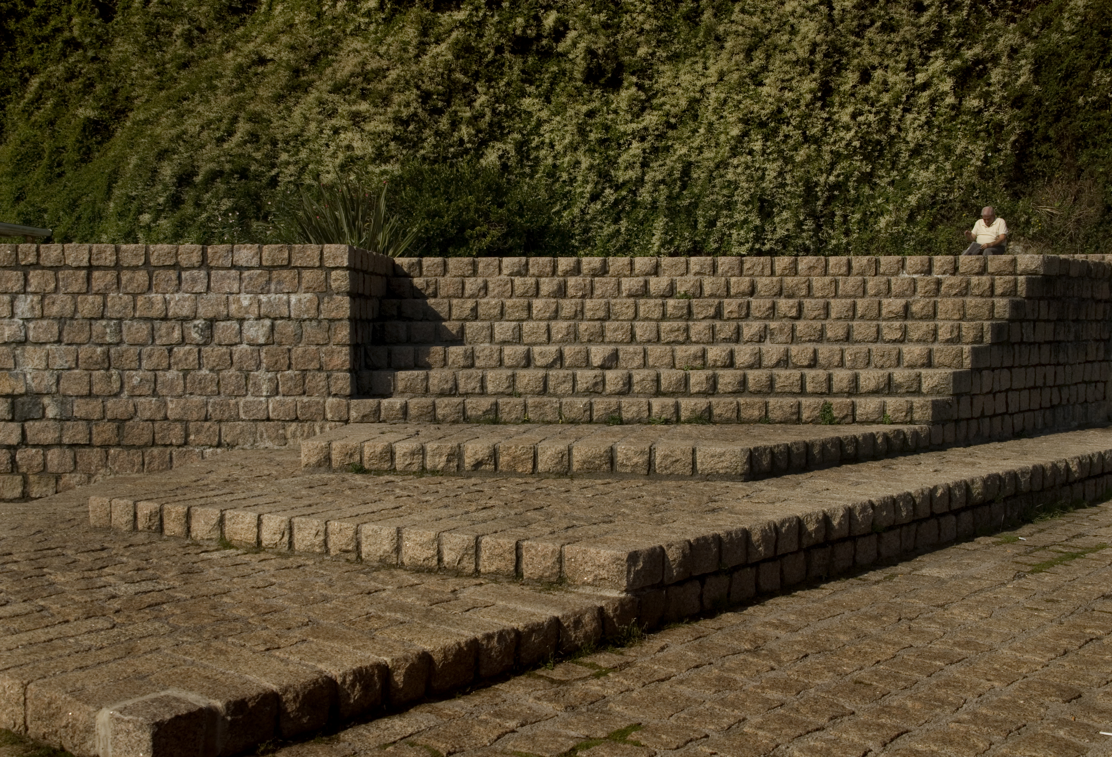 Haizearen orrazia.